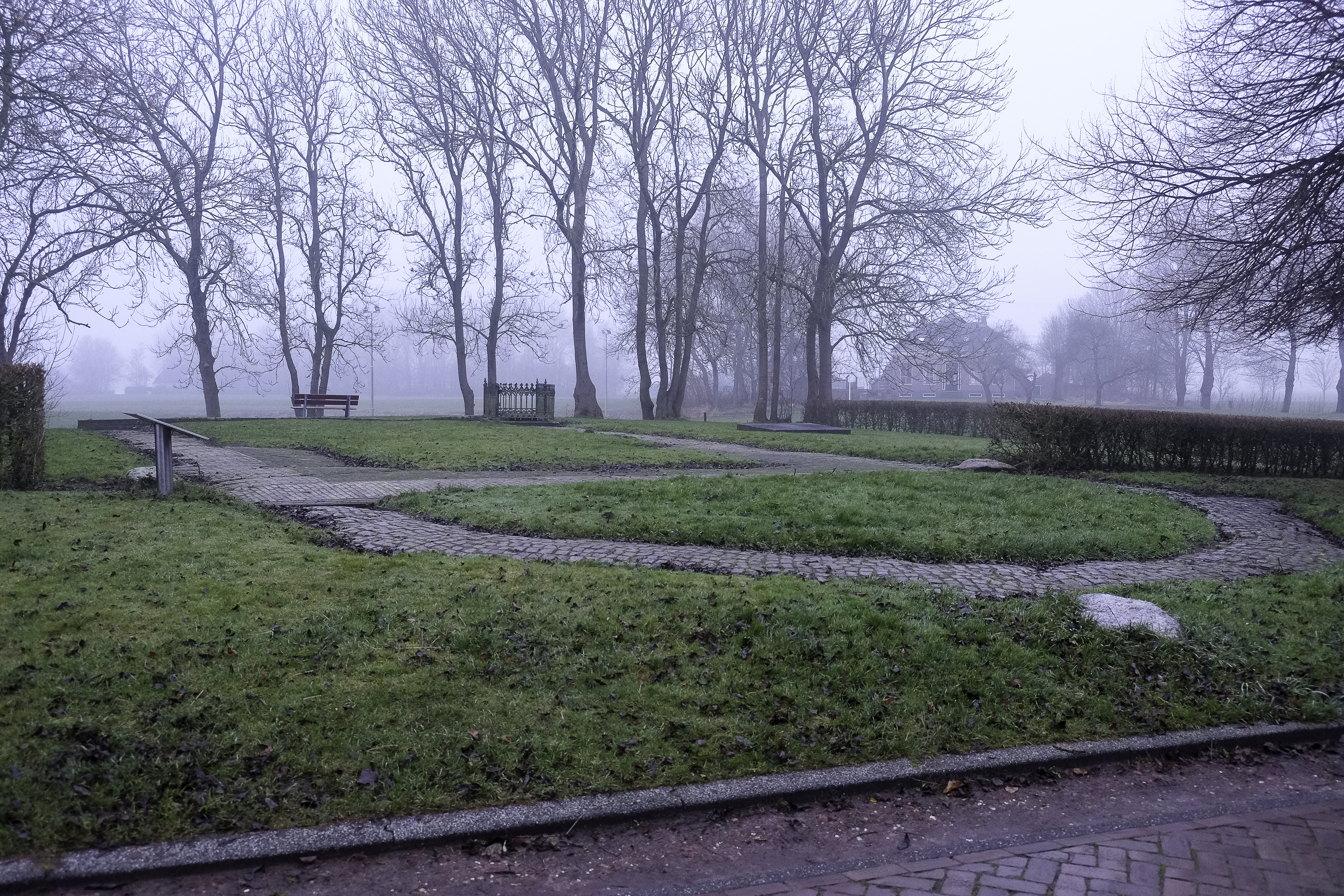 Locatie van de vroegere kerk van Sauwerd